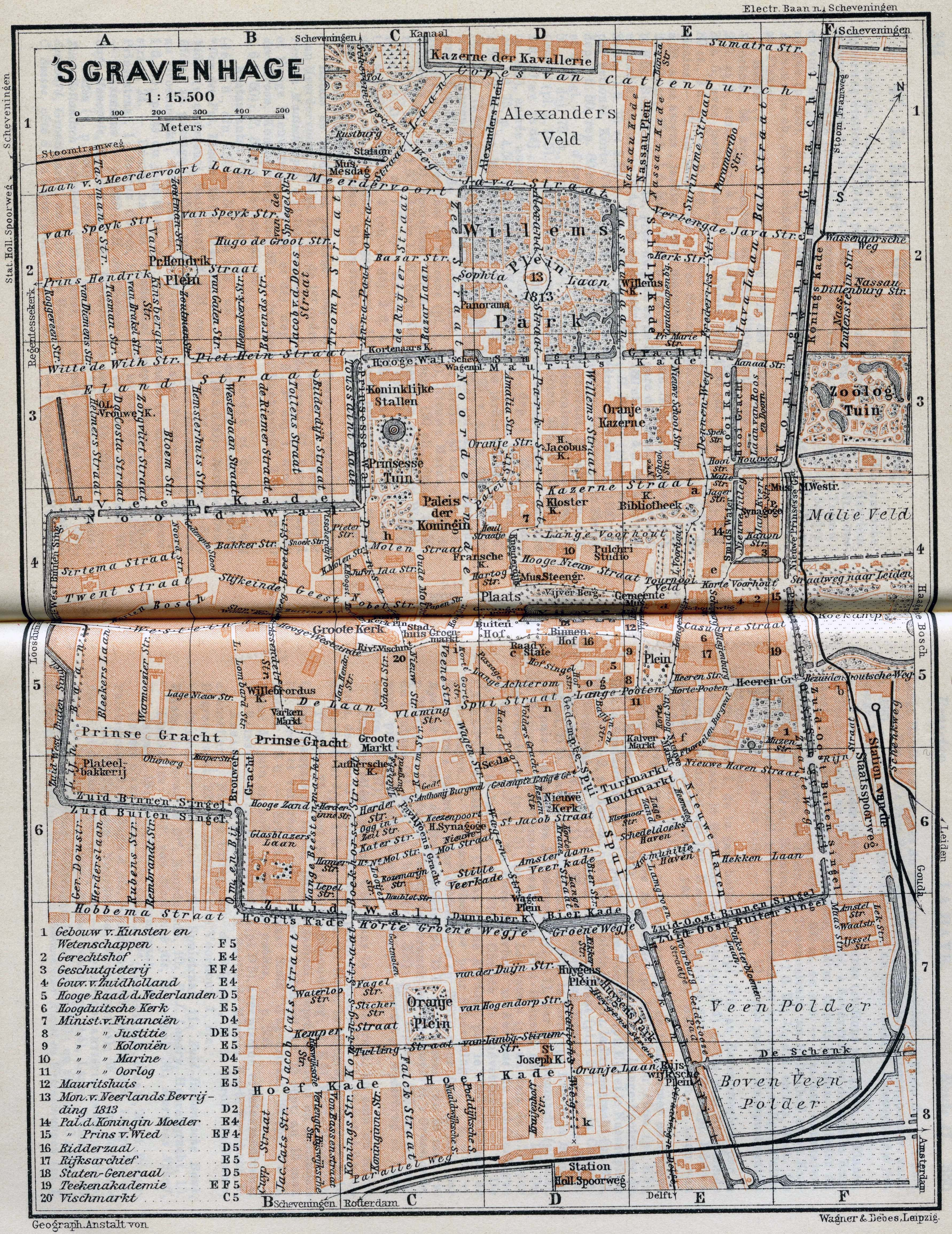 Inlegkaart van Den Haag uit de Baedeker reisgids van 1905